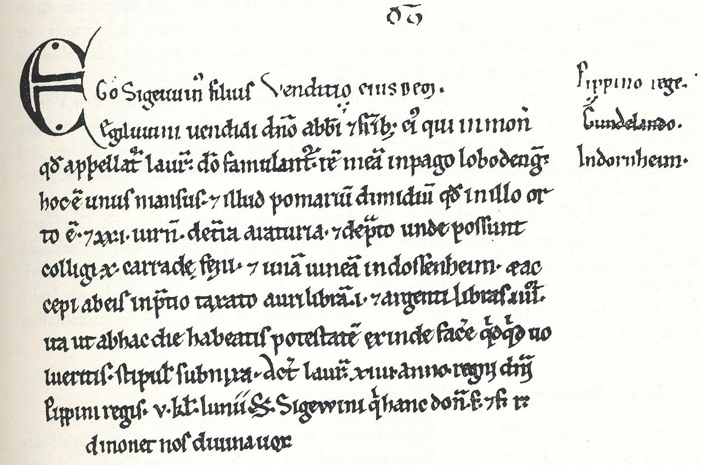 Lorscher Kodex von 766, 6. Zeile von oben:Dossenheim